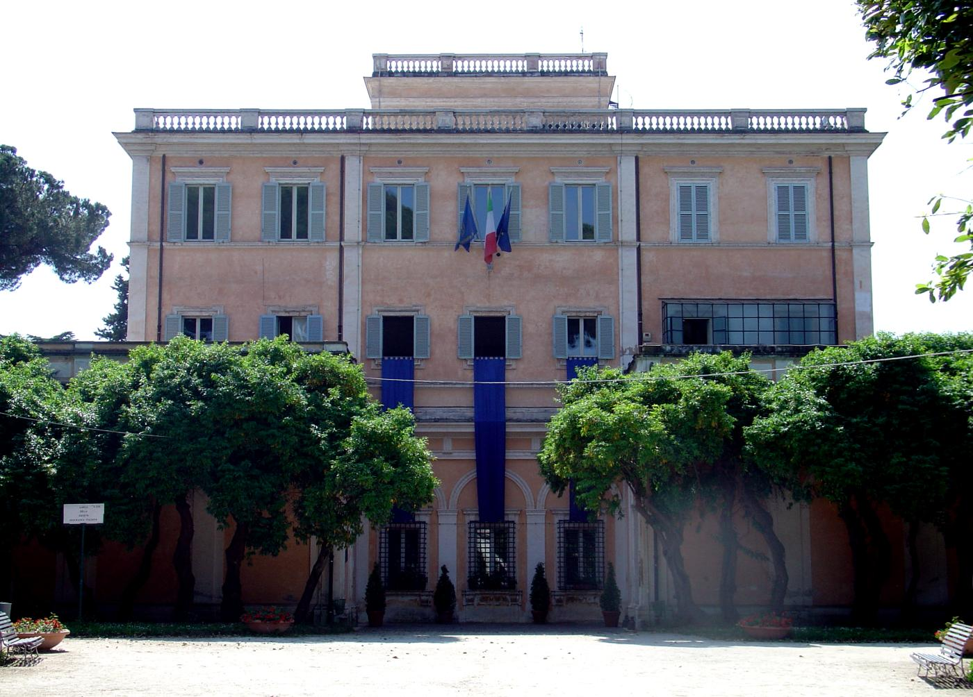 Palazzetto Mattei, sede della Societa geografica italiana, Roma, Villa Celimontana